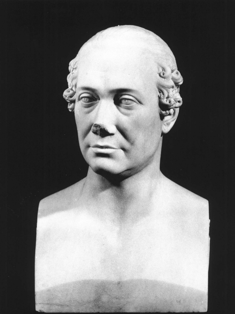 Busto di Giambattista Spolverini, opera di Giuseppe Poli (1857-1861). Il busto fa parte del Panteon Veneto, conservato presso Palazzo Loredan di Campo Santo Stefano a Venezia.